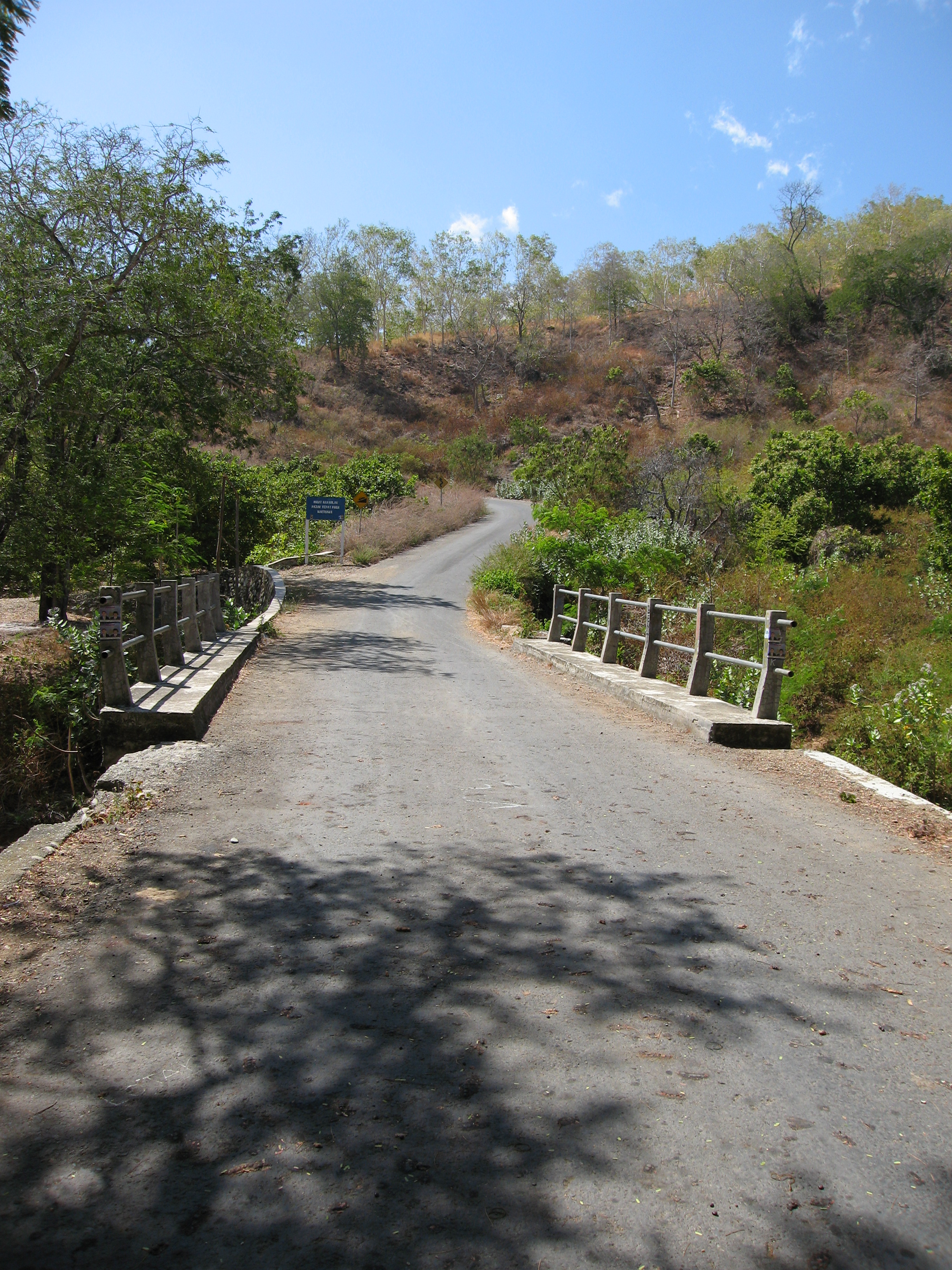 Jln di Sekitar Maritaing, Alor NTT